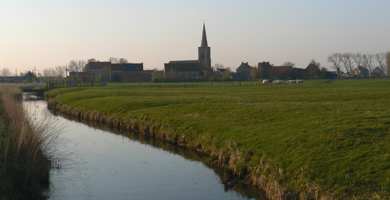 Oudekapelle gezien van langs de Oude zeedijk richting Lampernisse